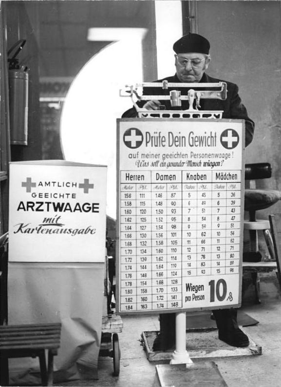 Berlin, Personenwaage ADN-ZB Franke 30.12.71 Berlin: Keine Kunden, keine Kunden. Wer steigt nach den Festtagen schon gern auf die Waage.